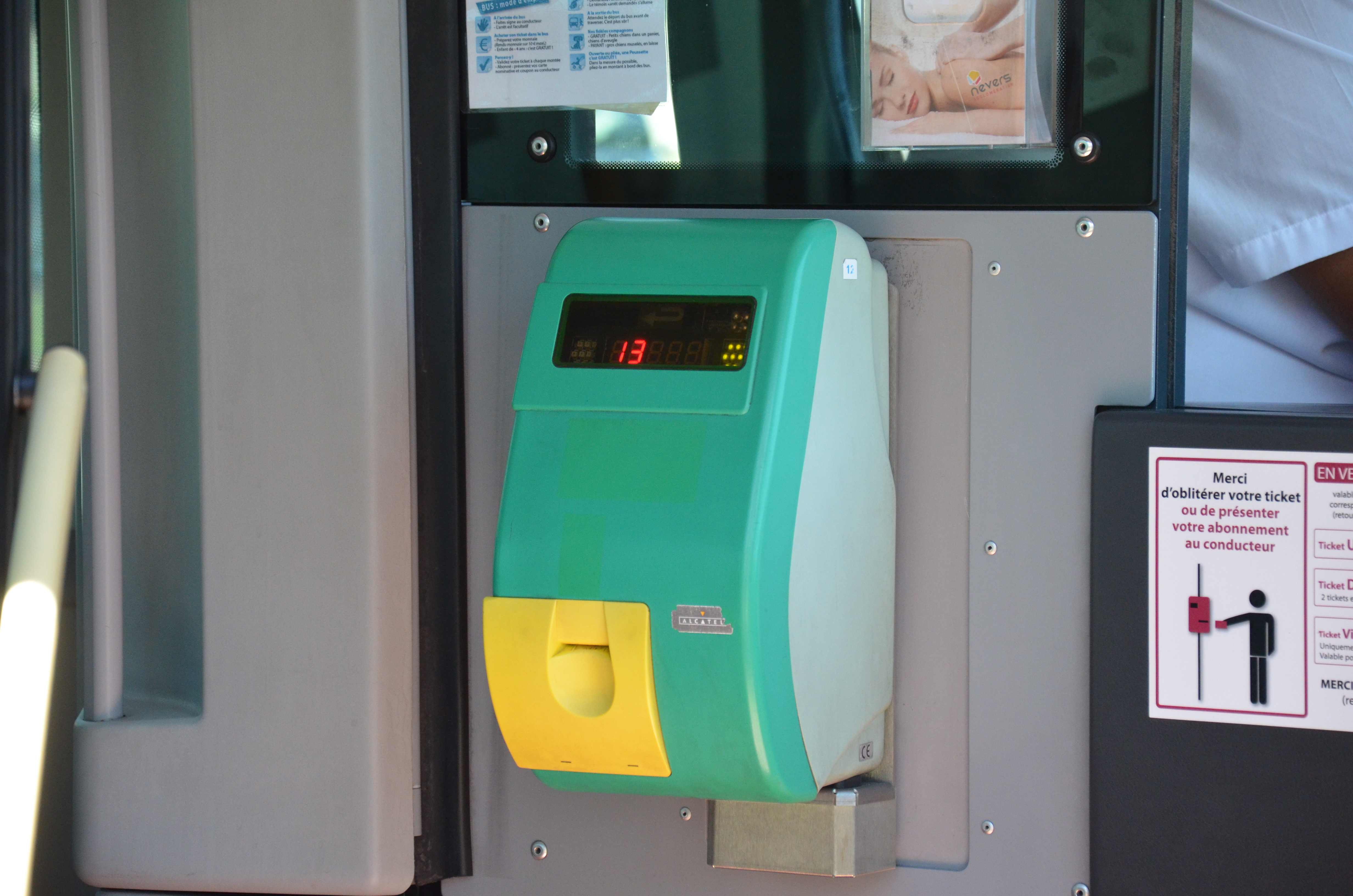 Oblitérateur à bord des bus du réseau Taneo de Nevers.